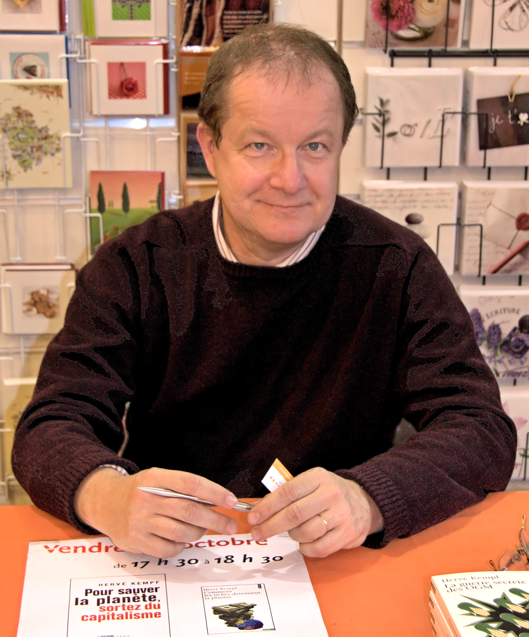 Hervé Kempf lors d'une séance de signature à la Maison du Livre à Rodez